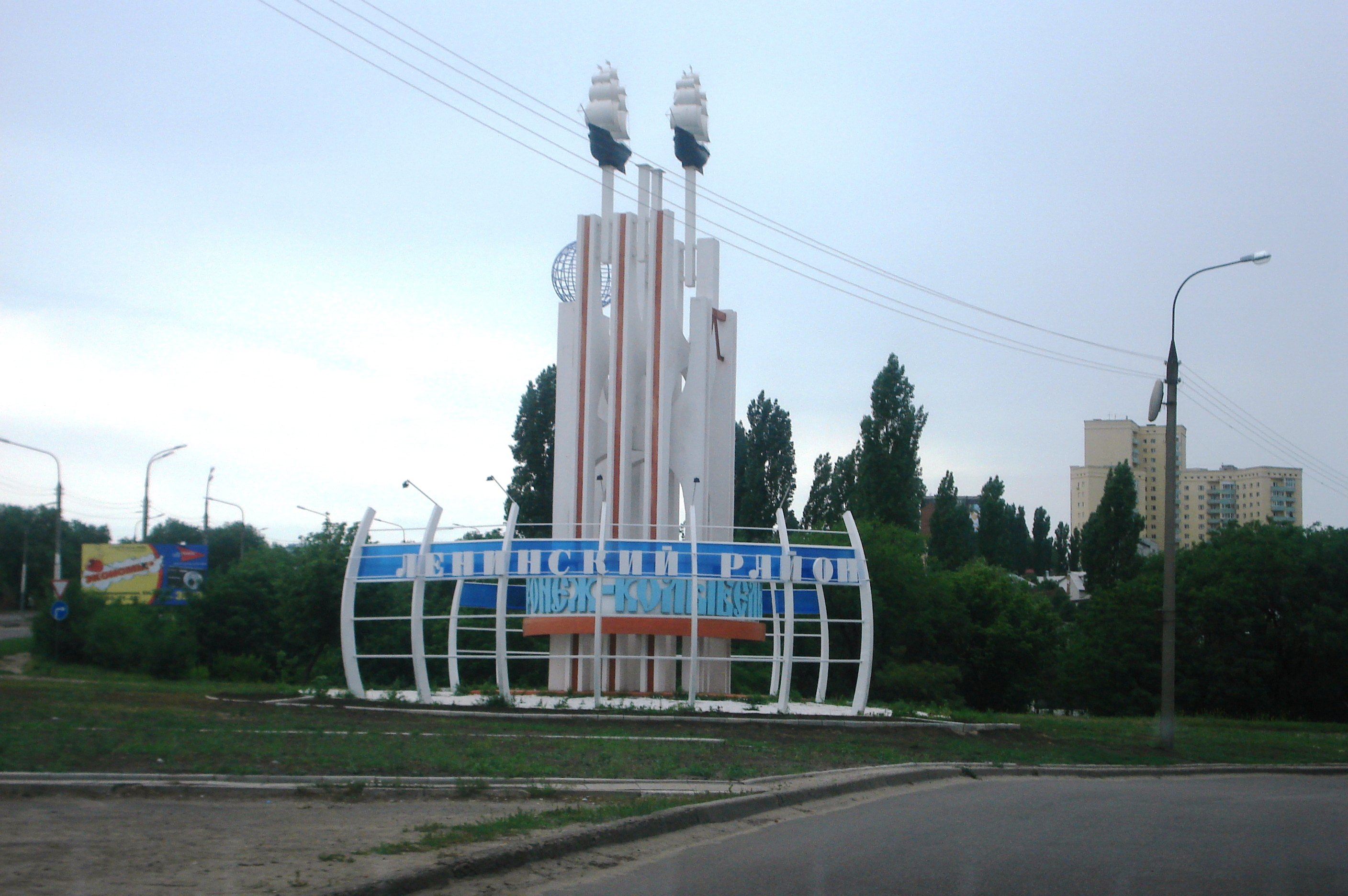 Стела на въезде в Ленинский район Воронежа